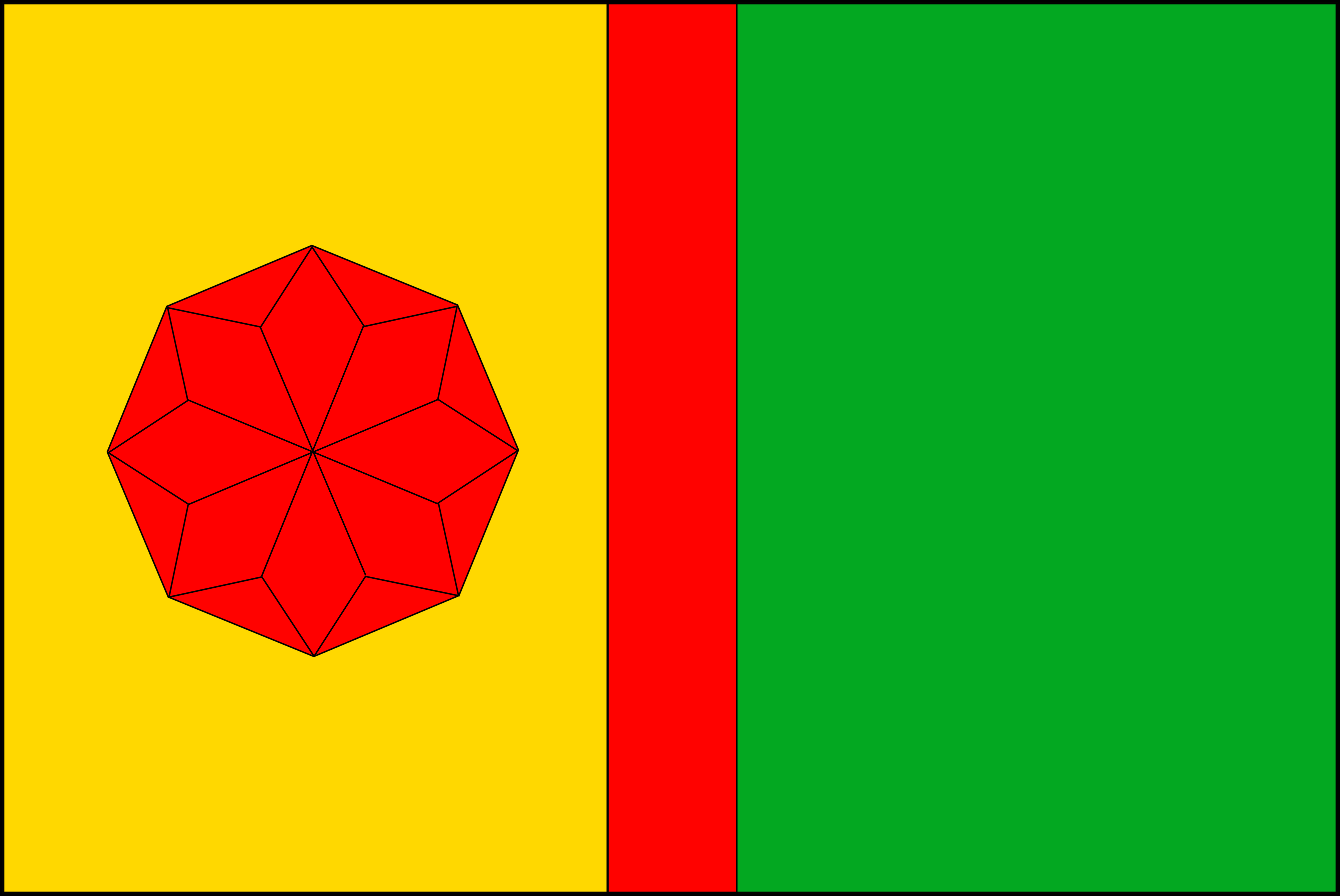 Vlajka obce Ratboř